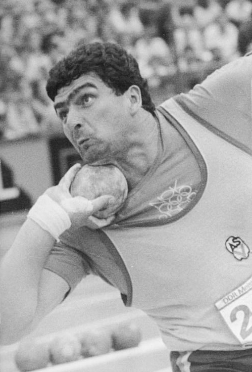 Udo Beyer ADN-ZB Thieme 10.08.81 Jena: 32. DDR-Meisterschaften in der Leichtathletik- Udo Beyer (ASK Vorwärts Potsdam) holte sich am 9.8. im Jenaer Ernst-Abbe-Sportfeld den Titel im Kugelstoßen. Der Weltrekordler mußte zwar nach dem Vorkampf verletzt ausscheiden, hatte aber mit 21,44 m die Siegerweite bereits markiert.